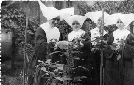 Sestre usmiljenke